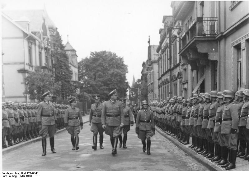 Besichtigung durch Gen. Daluege, Saarbrücken Oberst d[er] Sch[utzpolizei] Winkelmann, Genlt. d. OP v. Bomhard, ?, Daluege